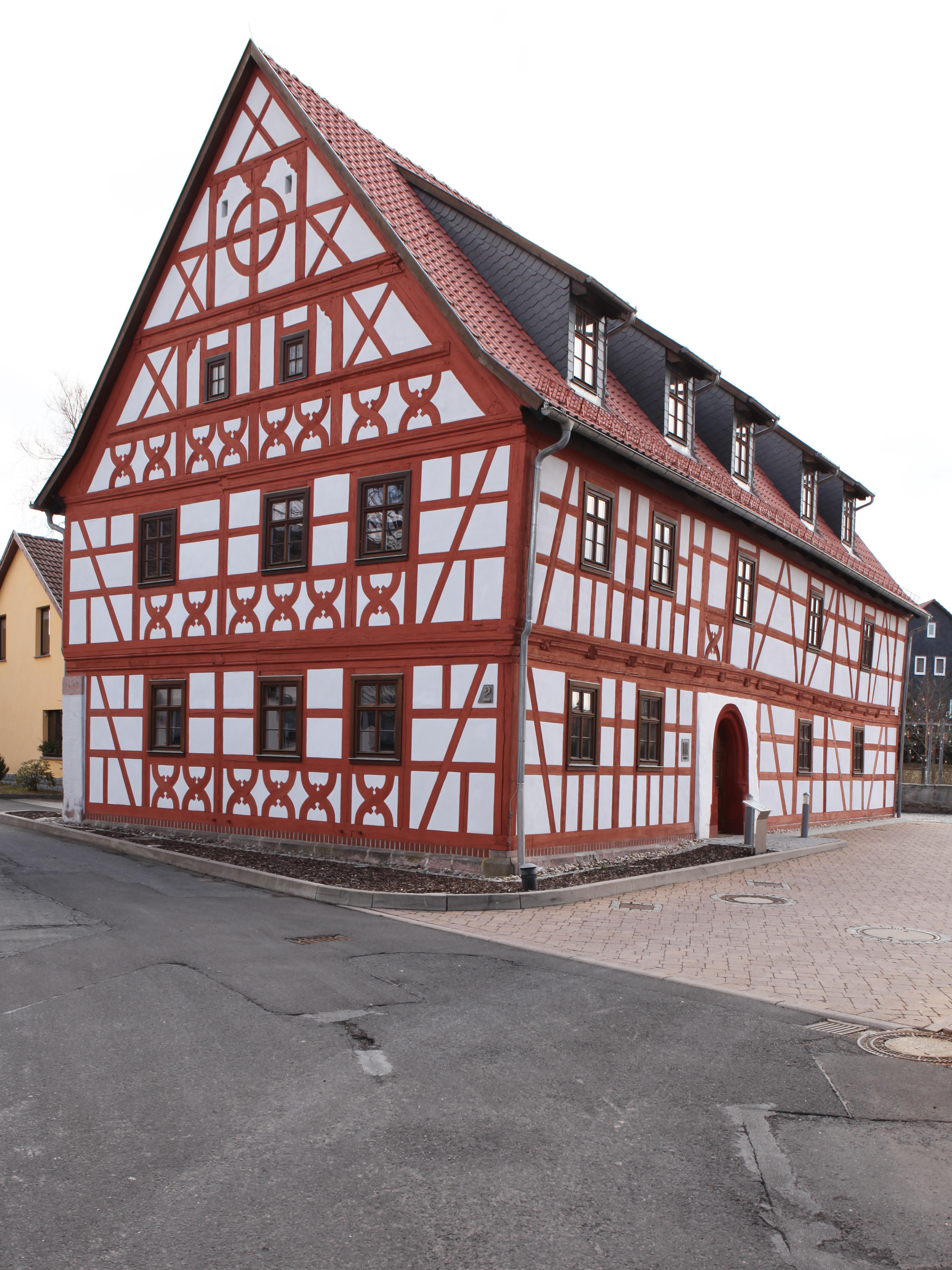 Brandtsköppshaus in Hinternah, denkmalgeschütztes Fachwerkhaus, erbaut 1607, saniert bis 2007, OT von Nahetal-Waldau, Landkreis Hildburghausen